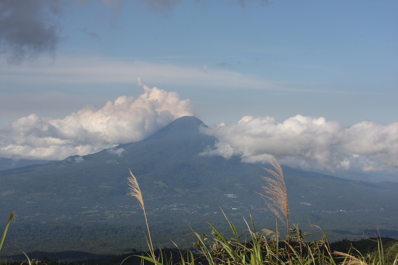 Gunung klabat vu du Mahawu